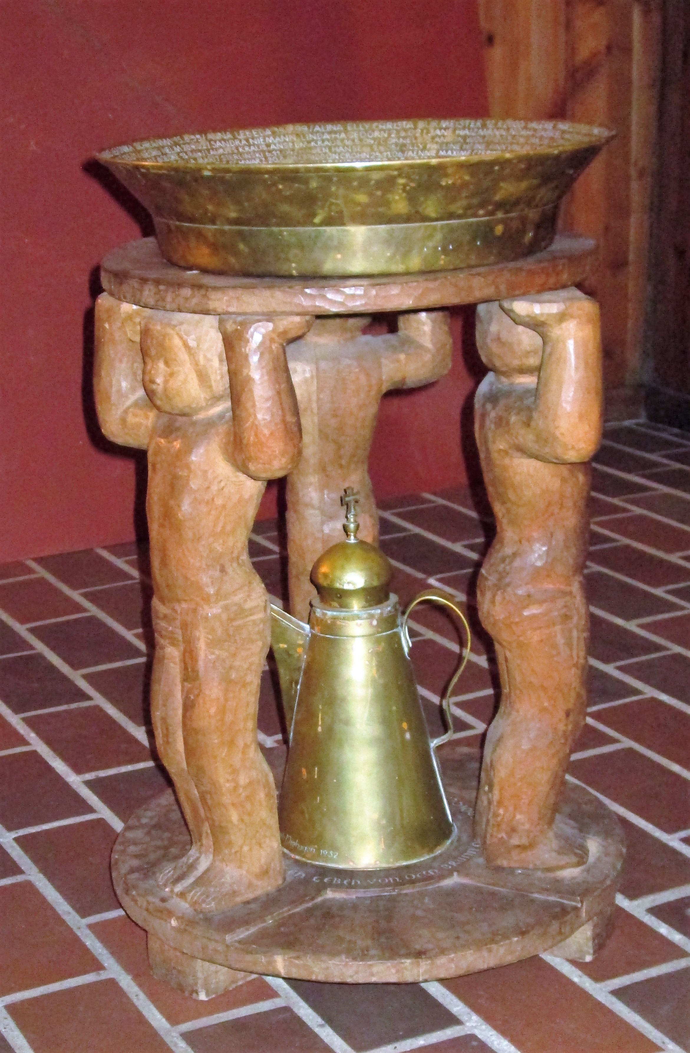 Taufschale in der Schifferkirche Ahrenshoop (Kreis Vorpommern-Rügen); Bildhauerin: Doris Oberländer-Seeberg